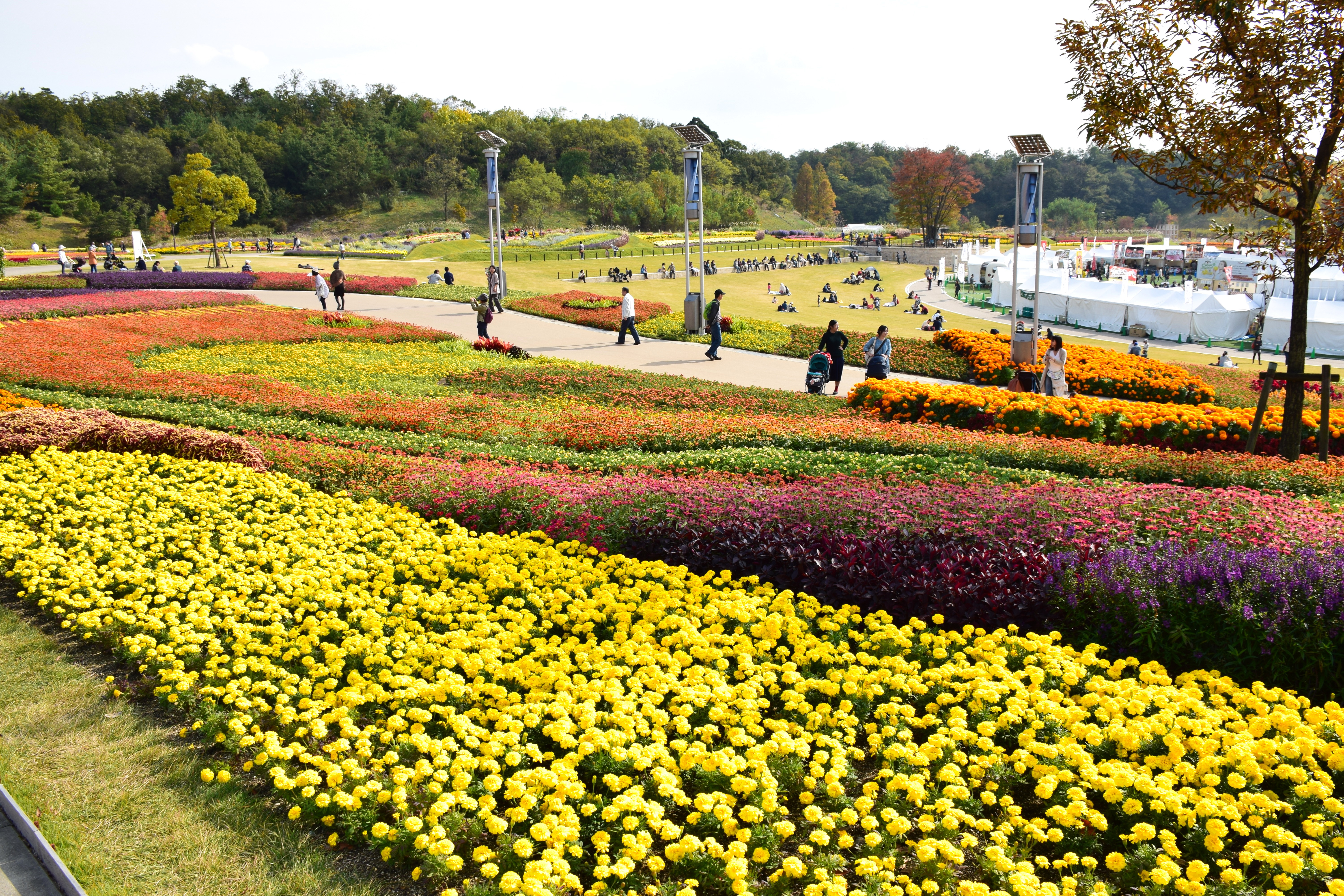 モリコロパークの園内風景